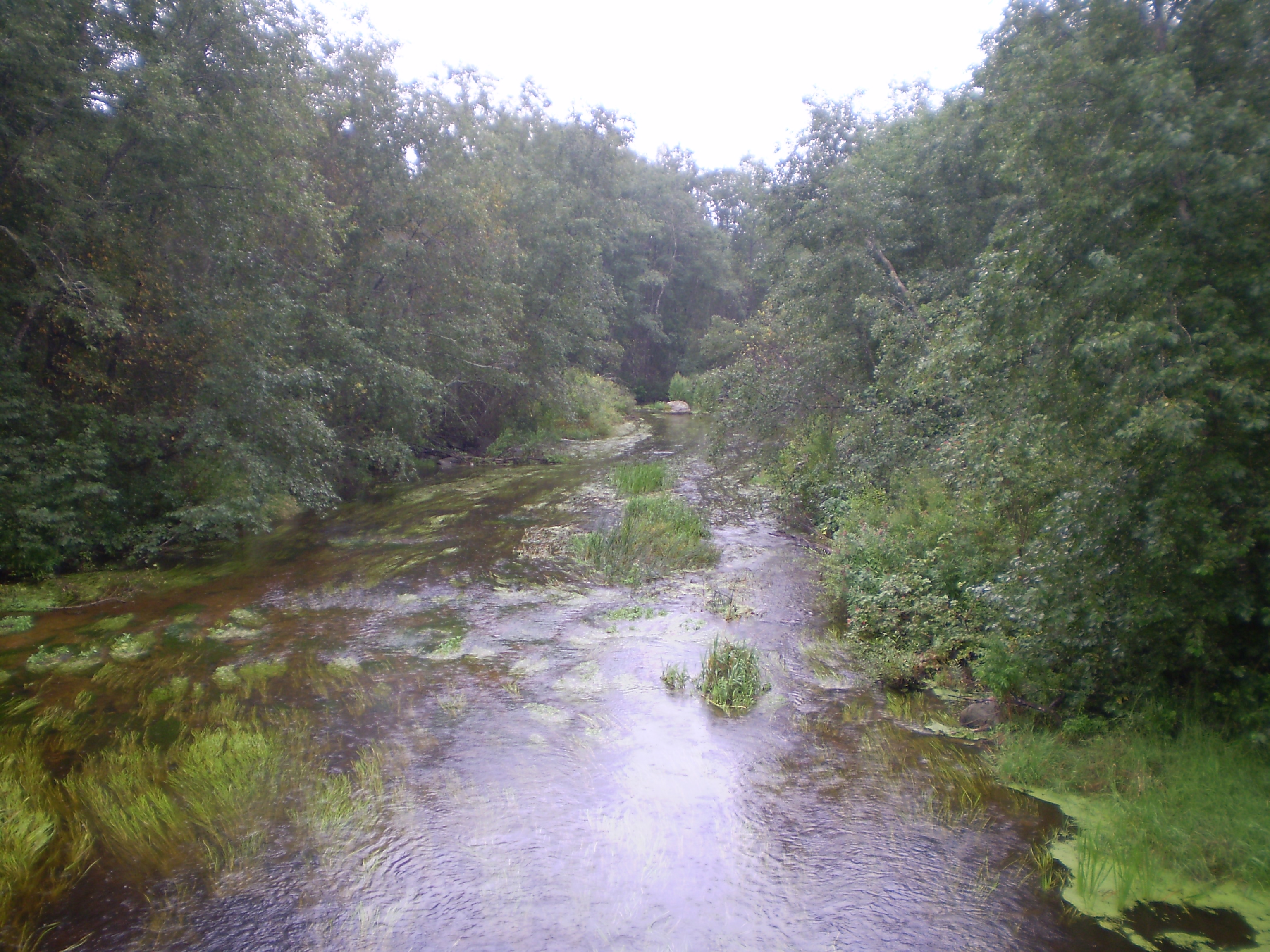 Река Вруда в б.дер.Лятцы на Н20